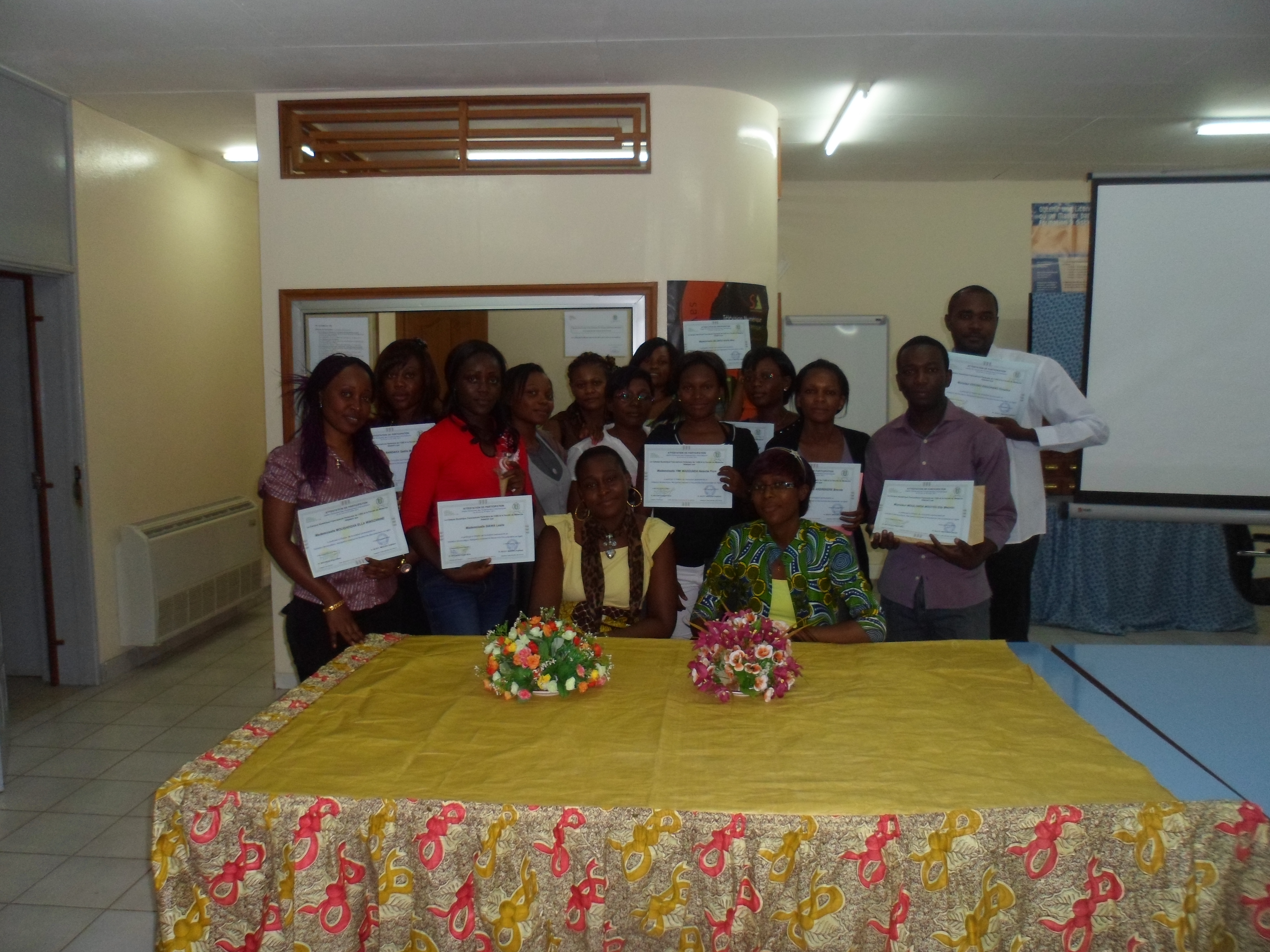 Remise d'attestations aux impétrants et photo de famille